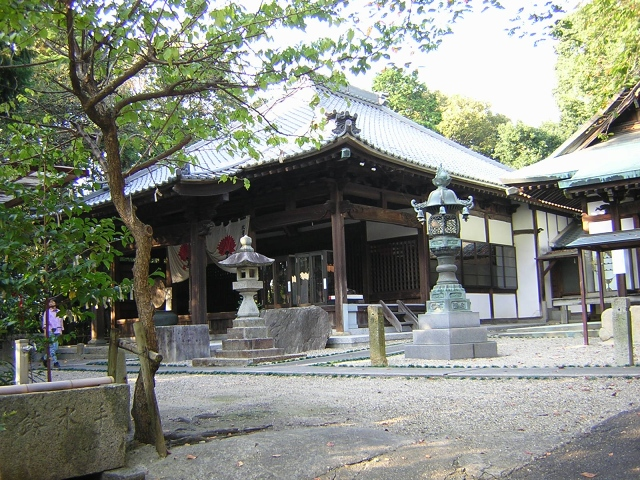 秋葉山山頂の神社